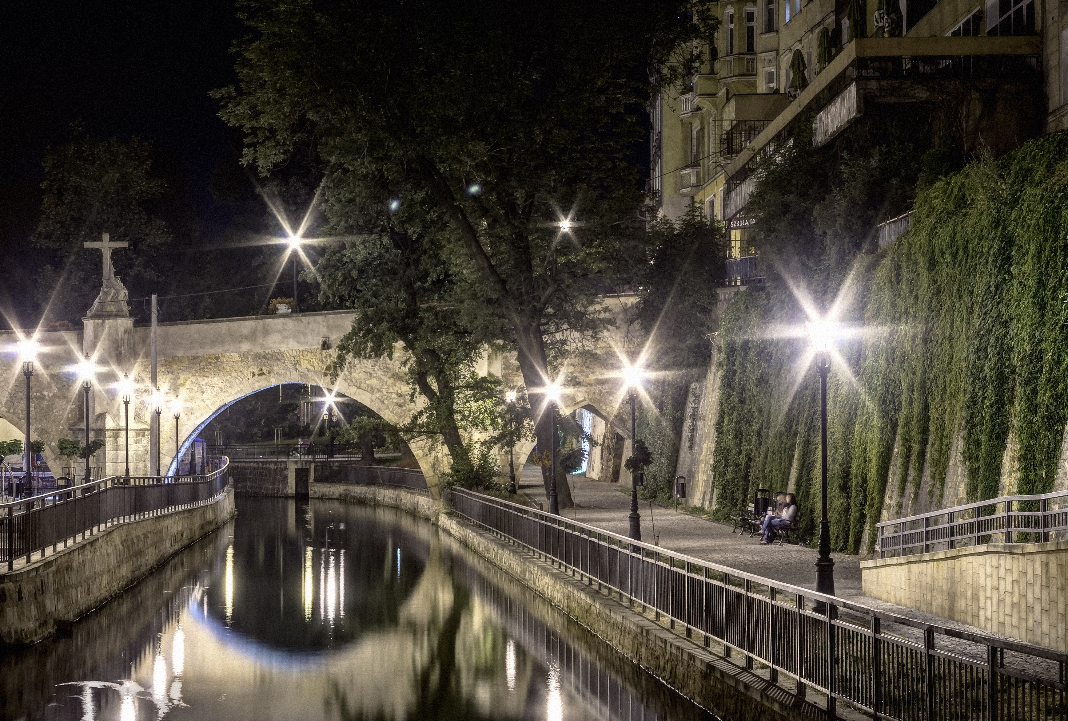 Kłodzko, most na młynówce, kon. XIV, 1628, 1701, 1750